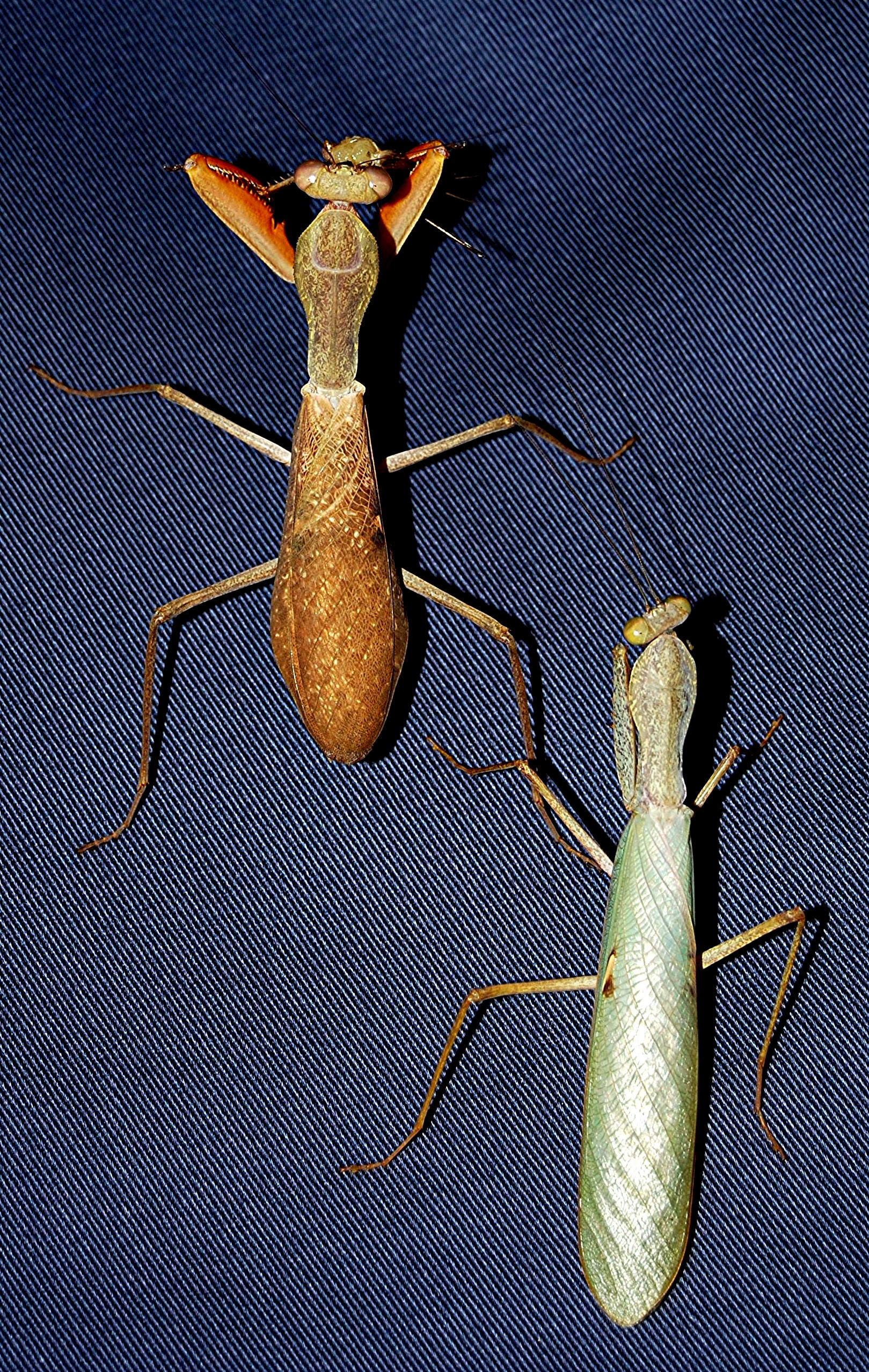 Sphodromantis lineola (♀ & ♂) vor Paarung